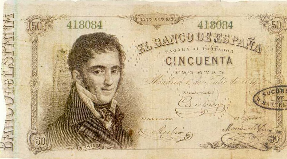 Billet de 50 pesetas datant de 1874 de ma collection personnelle